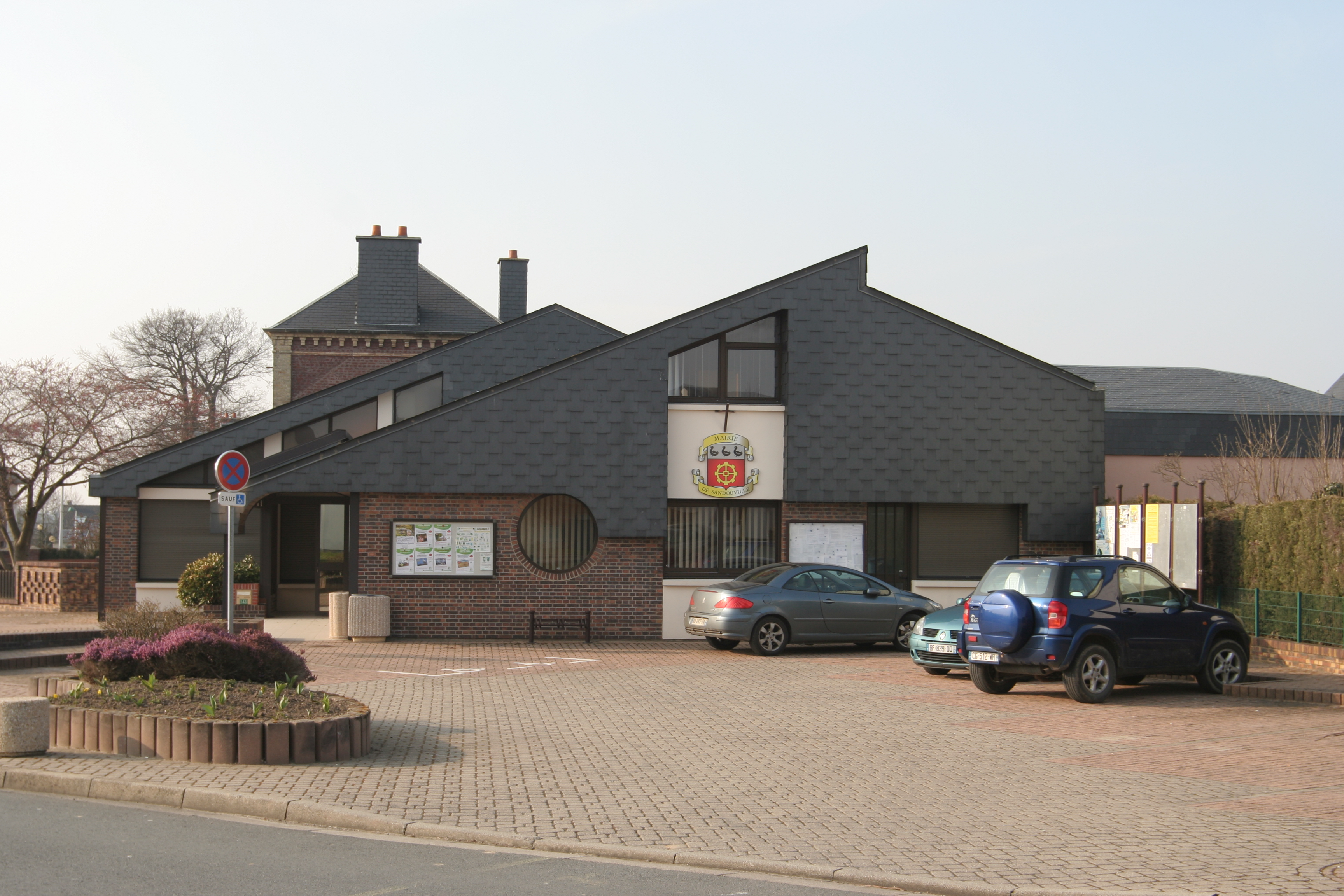 École de Sandouville.